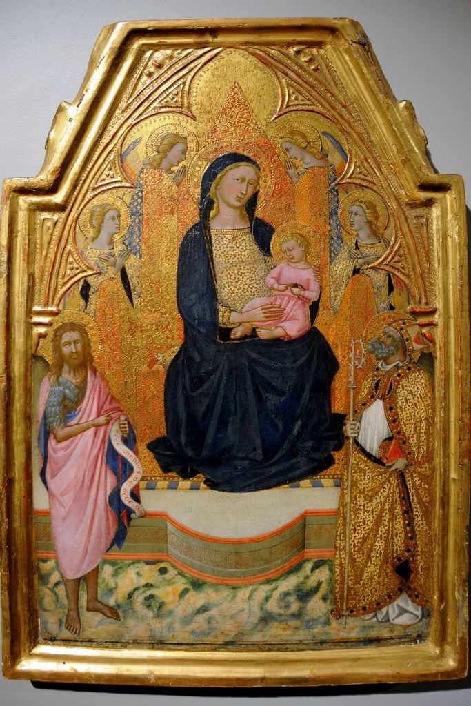 Madonna and Child enthroned.Niccolo di Buonaccorso c.1380. Boston MFA